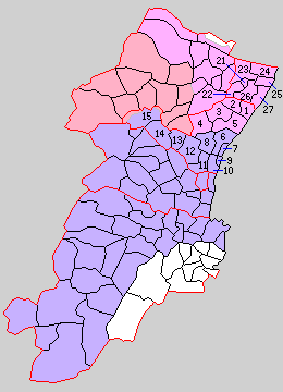 三重県河曲郡・奄芸郡の町村制時点の町村。